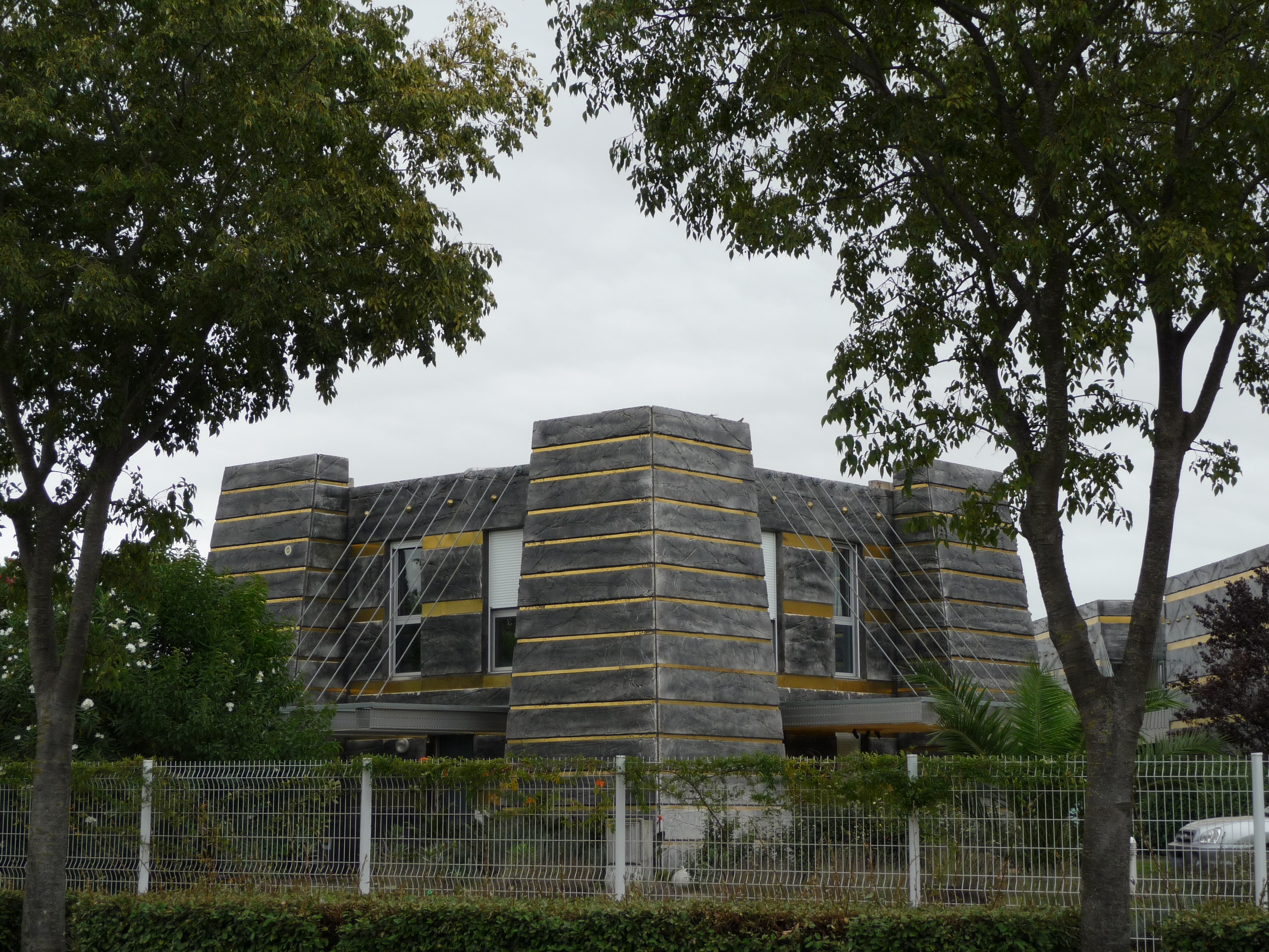 Collège Paul-Émile Victor à Agde (Hérault, France)